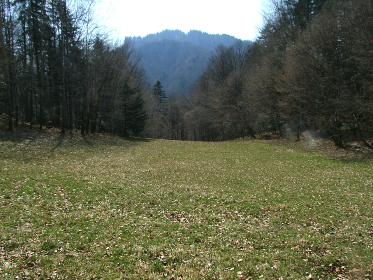 Polana Walusiówka w Pieninach i widok na Masyw Trzech Koron